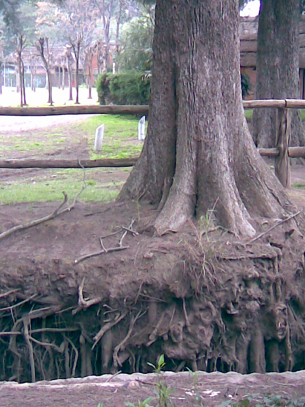 Raíces de un árbol.